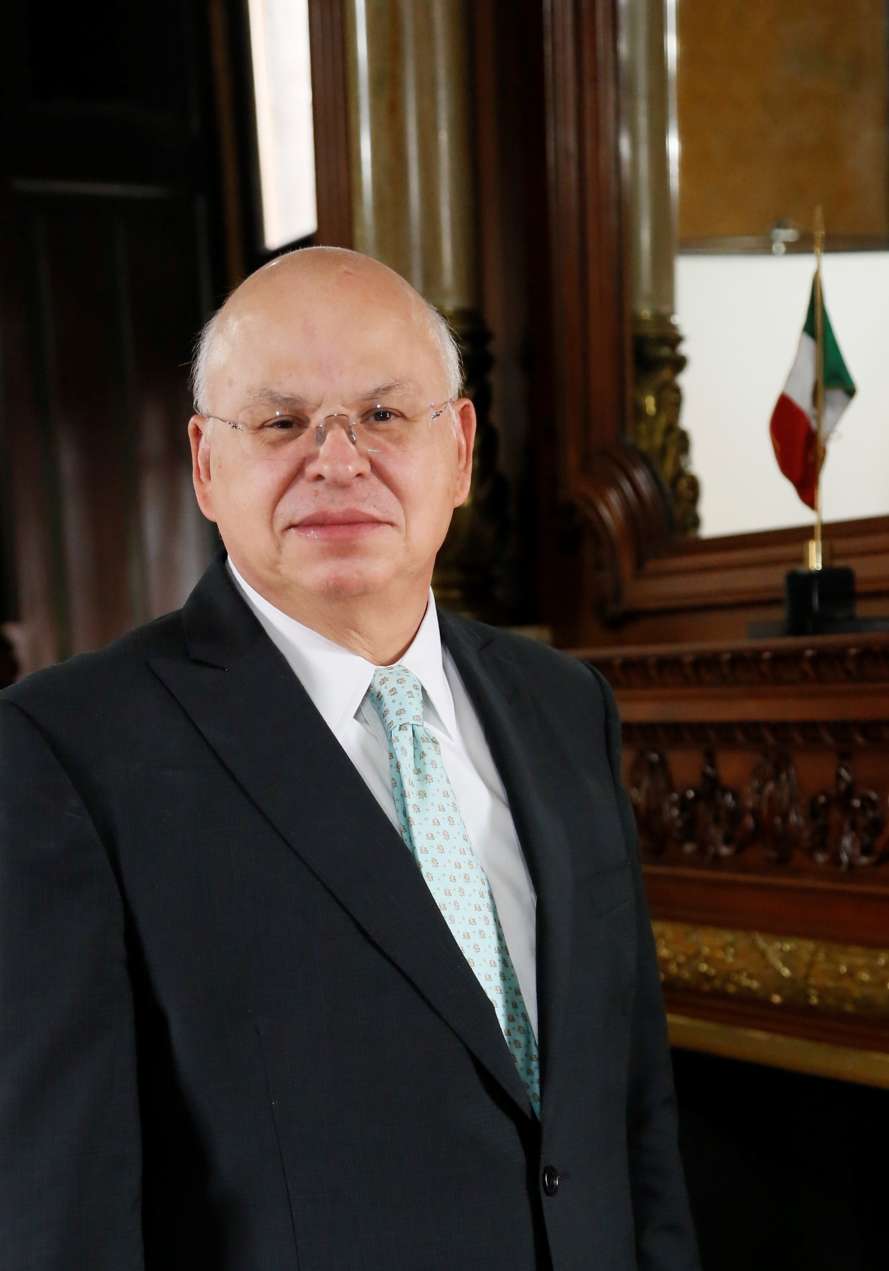 Rodolfo Tuirán Gutiérrez Subsecretario de Educación Superior